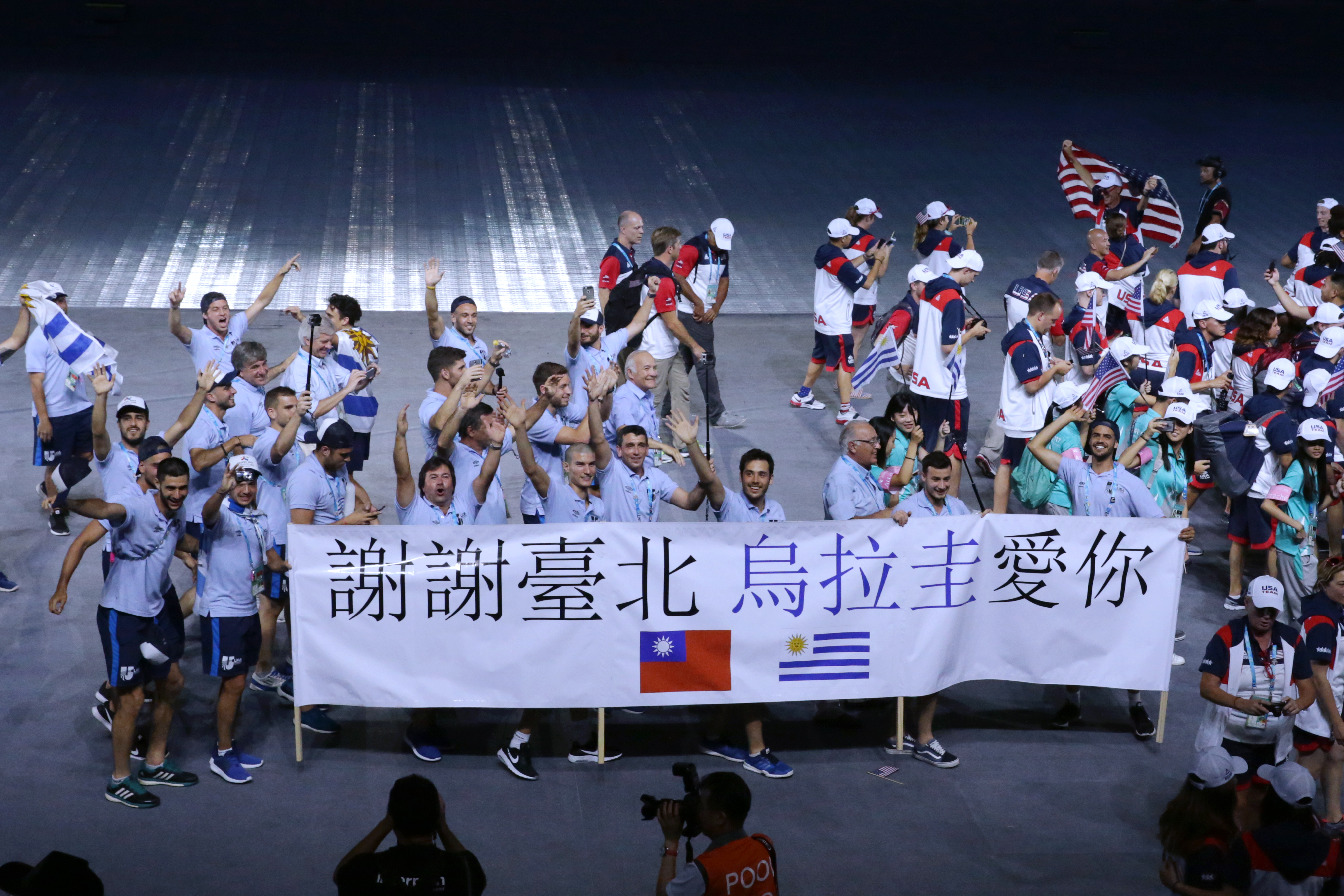 2017年世界大學運動會烏拉圭代表團進場